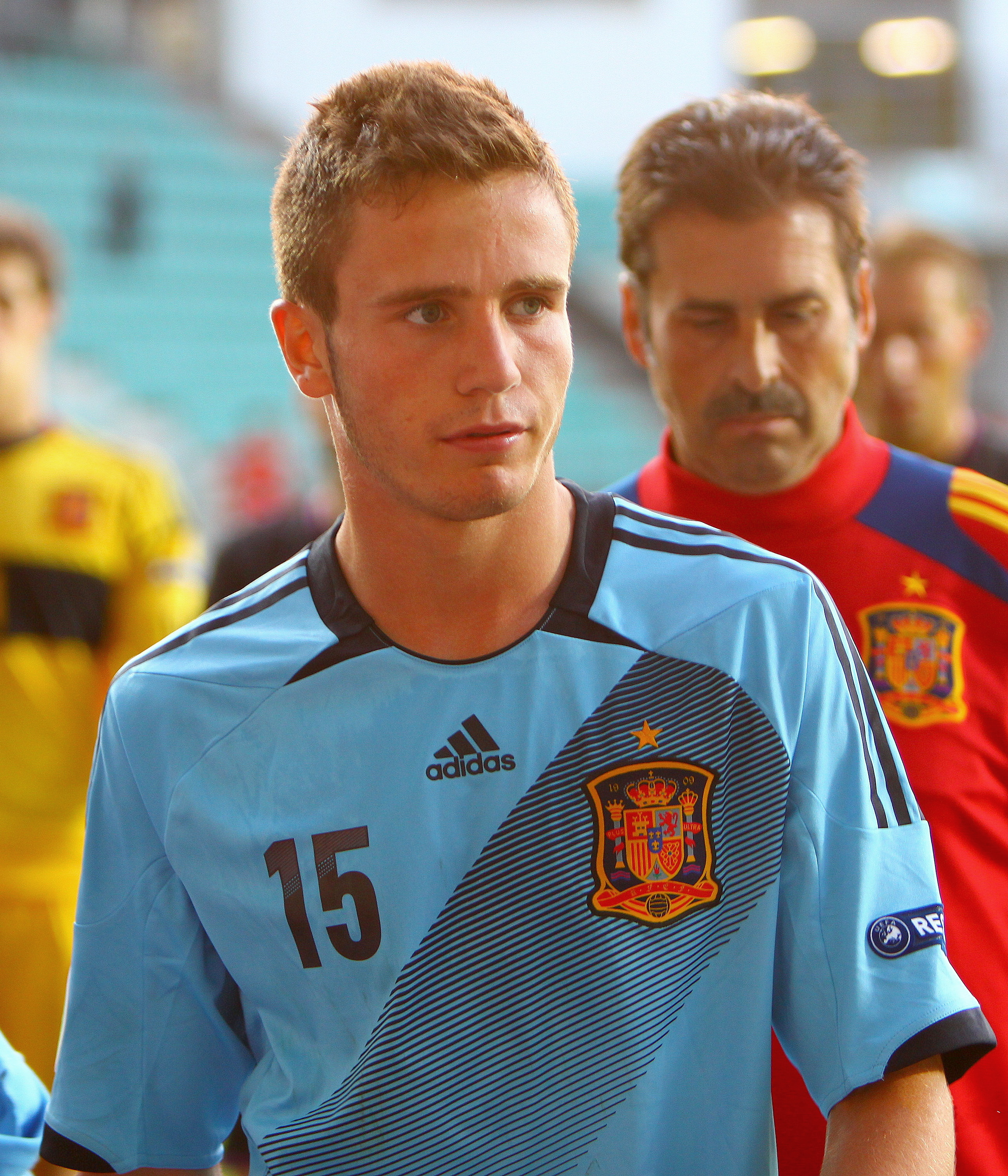 U-19 Portugal vs Spain.